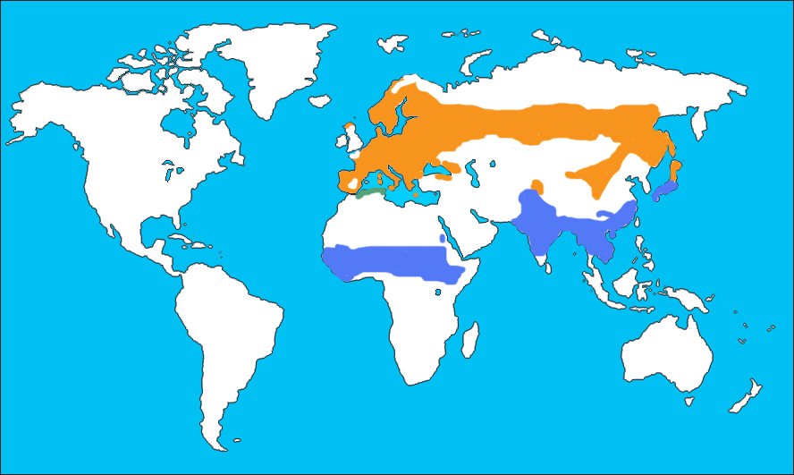 Jynx torquilla elterjedési térképe